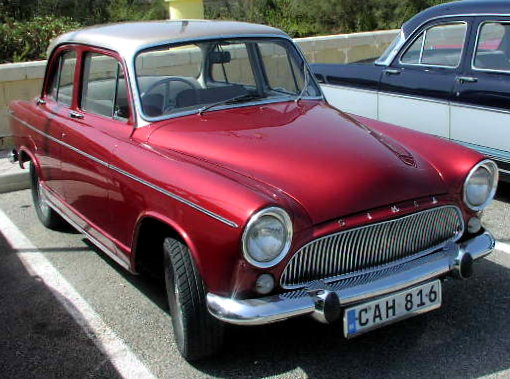 Simca Aronde